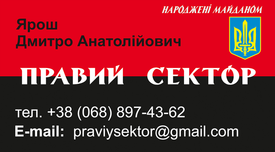 Візитка Яроша (жаба)